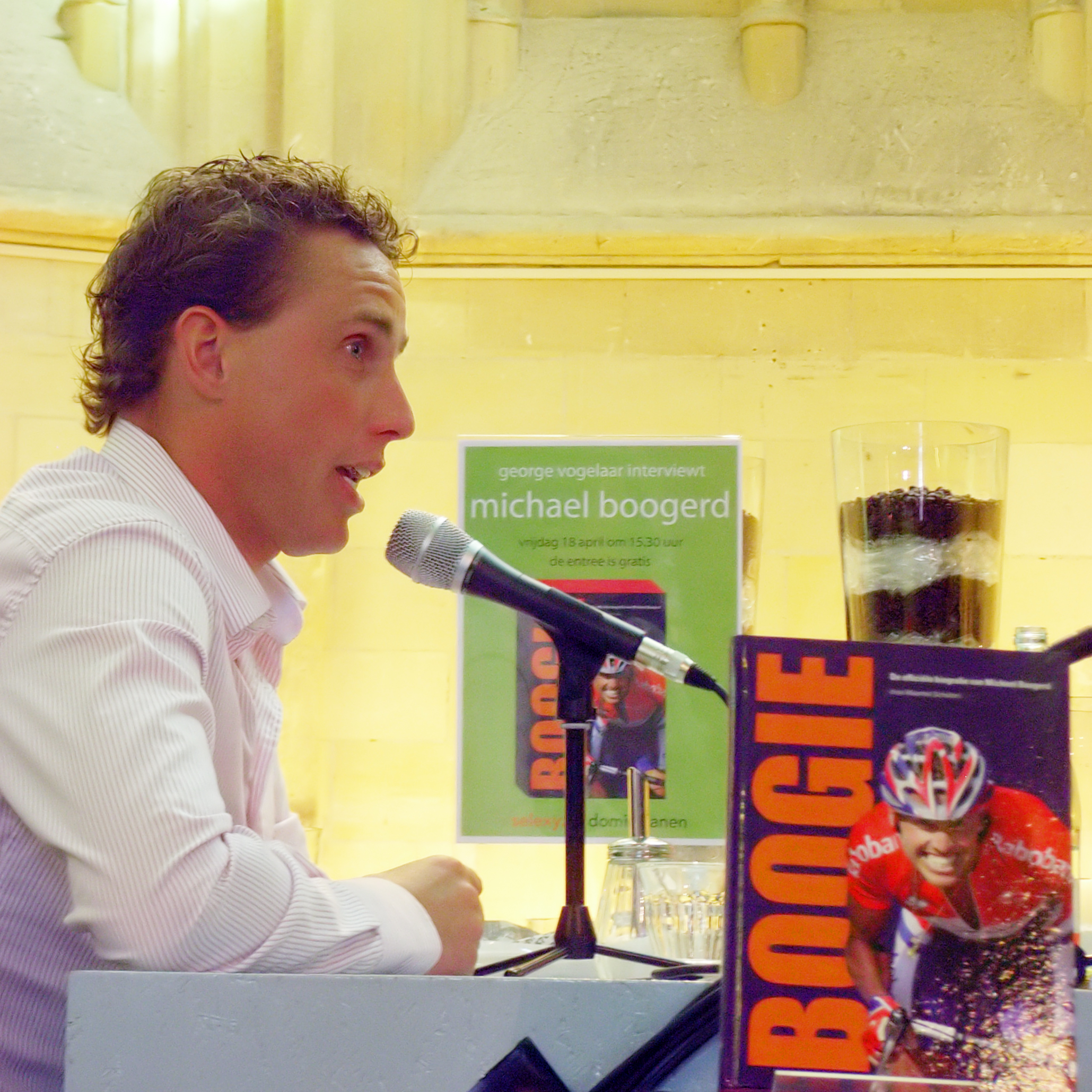 Oud-wielrenner Michael Boogerd presenteert het boek Boogie, auteur M. Scholten 2008